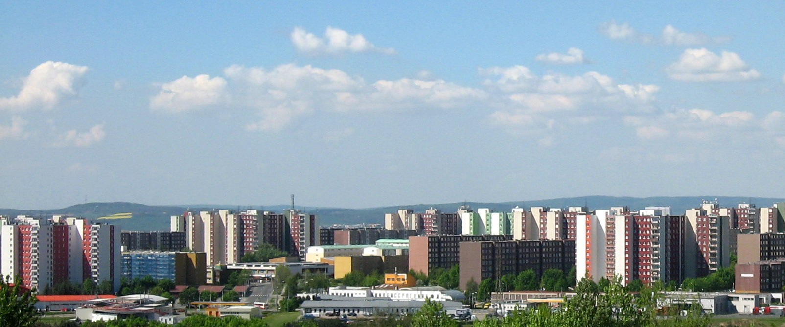 Vinohrady z cesty směrem na Hády